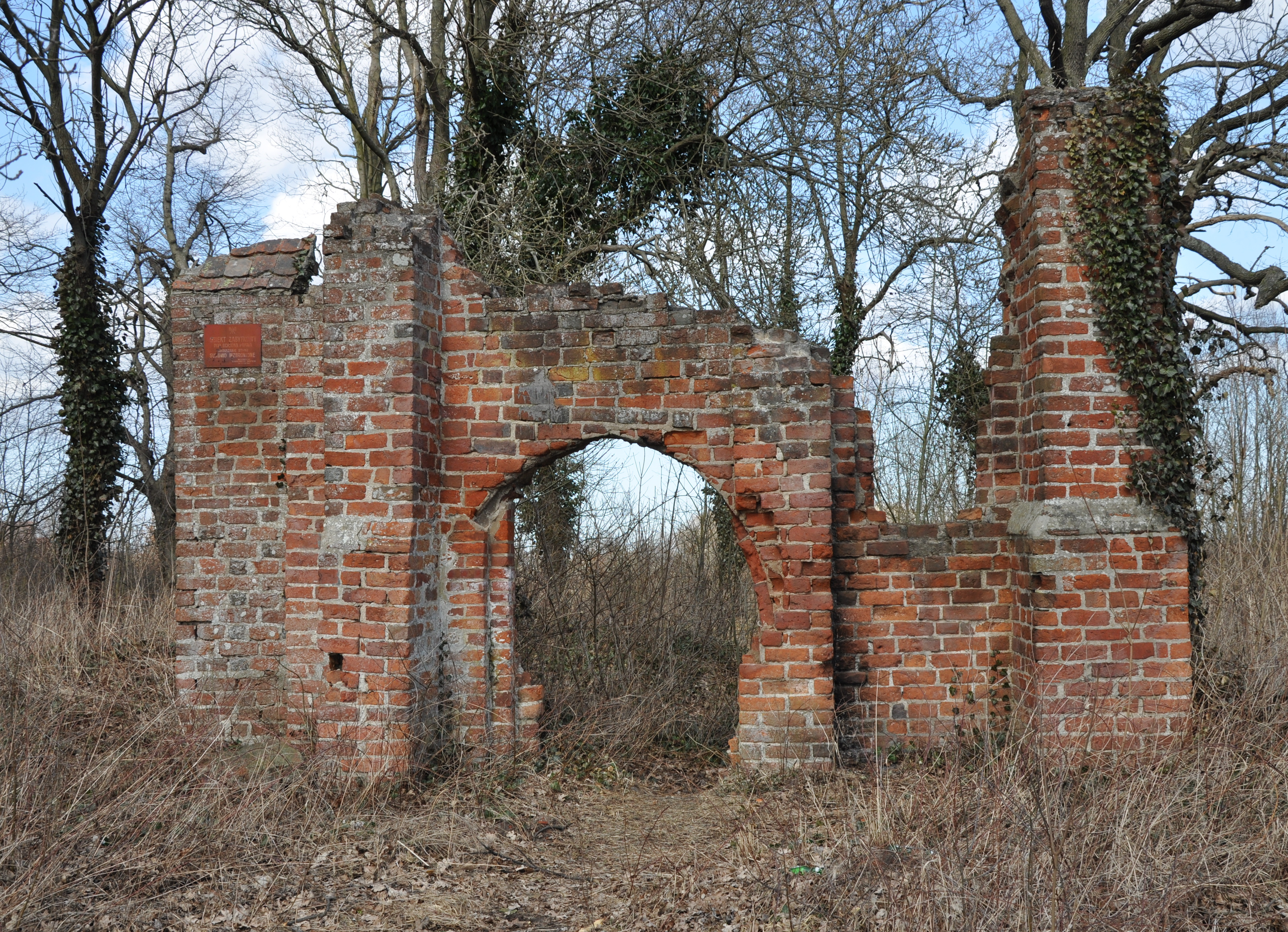 Ściana południowa ruin kościoła na Wyszkowie w Trzebiatowie